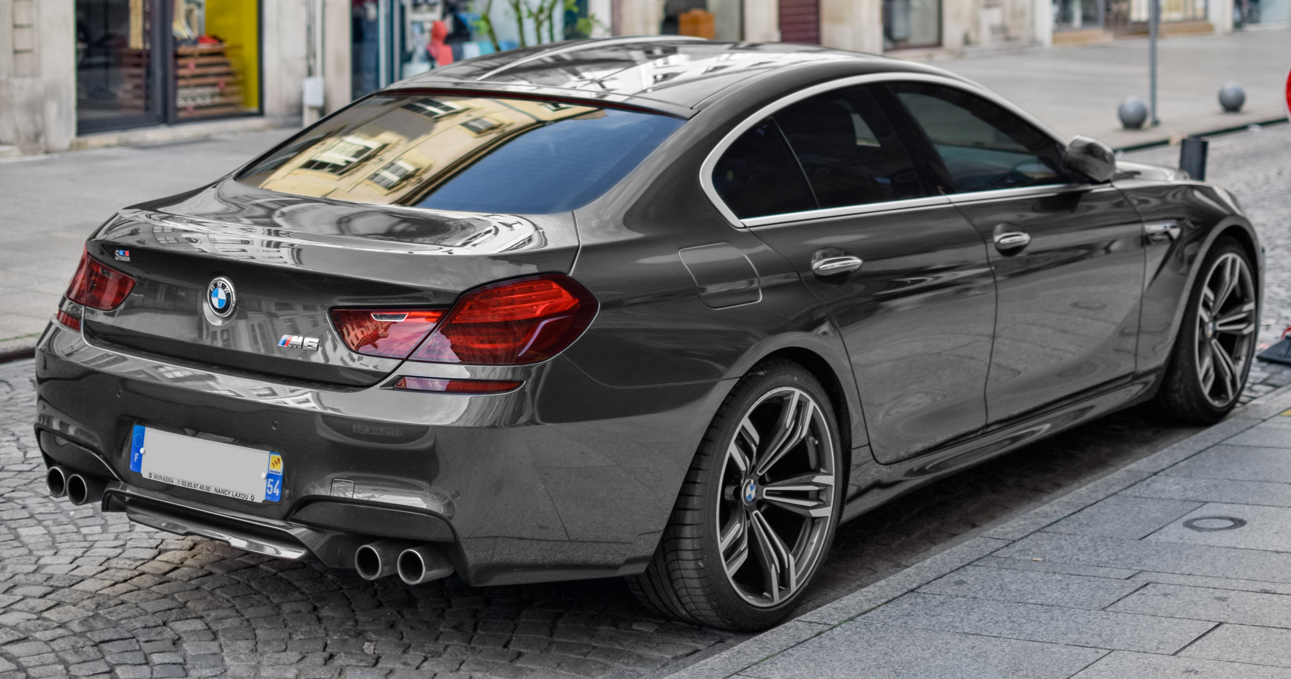 Couleur : Spacegrau Métallisé